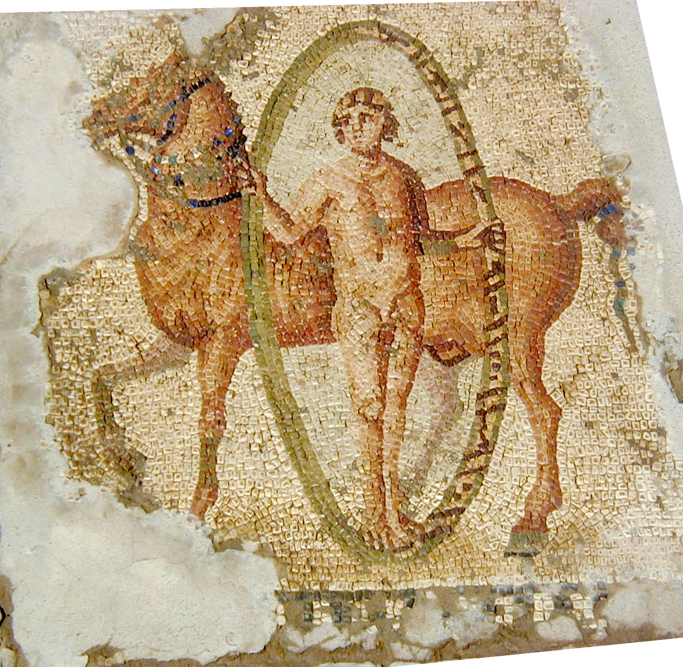 Panneau de la mosaique des chevaux de Carthage